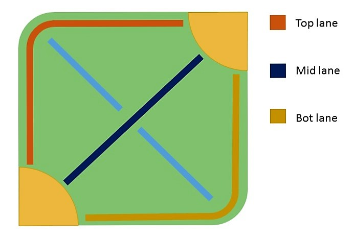 Rappresentazione semplificata della Summoner's Rift, in cui sono messe in risalto le corsie.